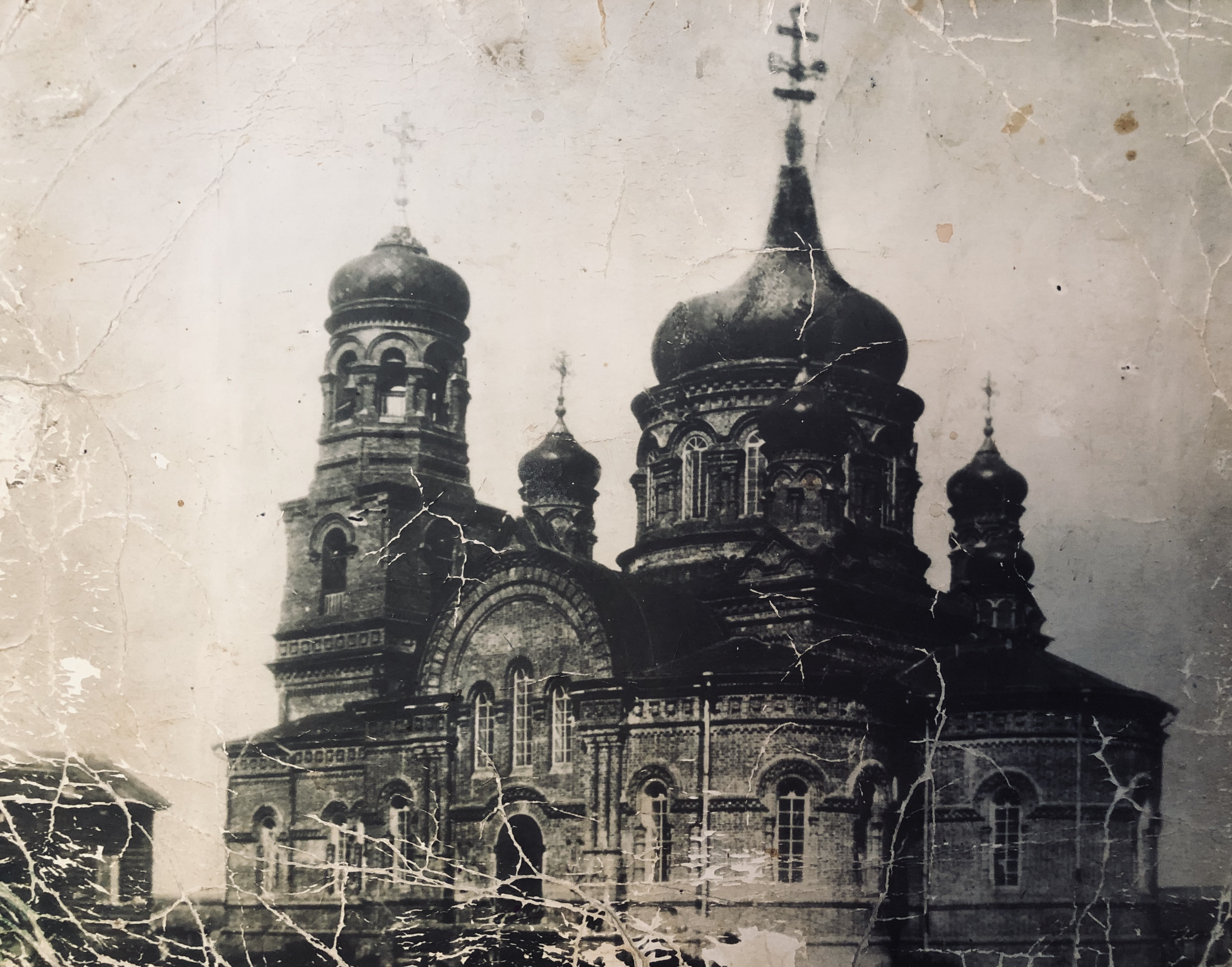 Фото Церкви Живоначальной троицы с. Крестниково